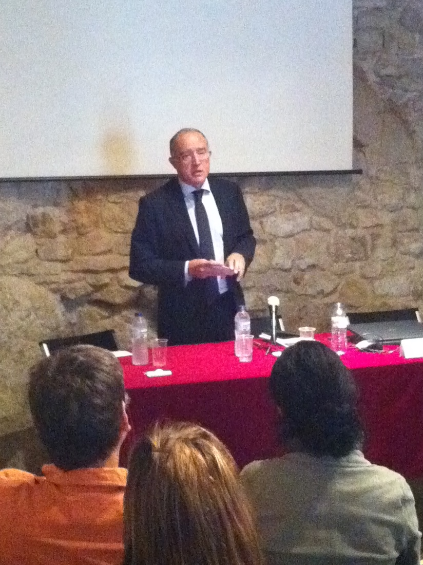 Salvador Cardús a la II Jornada cultura i medi ambient